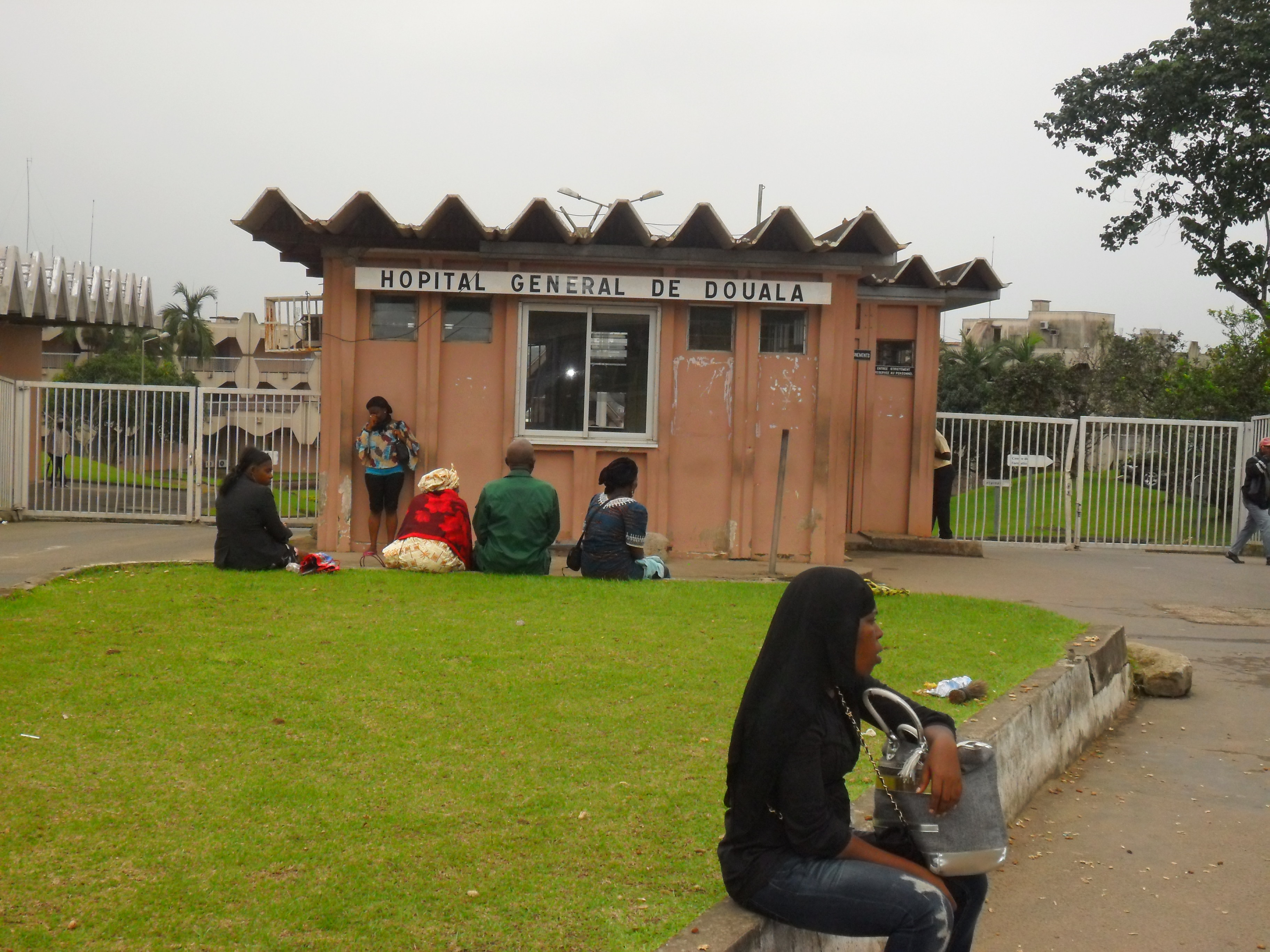 Entrée de l'Hôpital Général de Douala